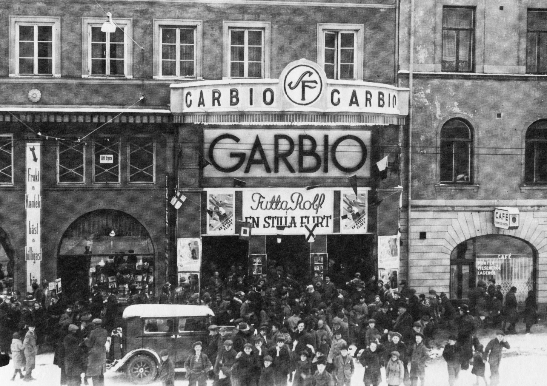 Biografen "Garbio" på Hornsgatan 72, En stilla flirt (1934)